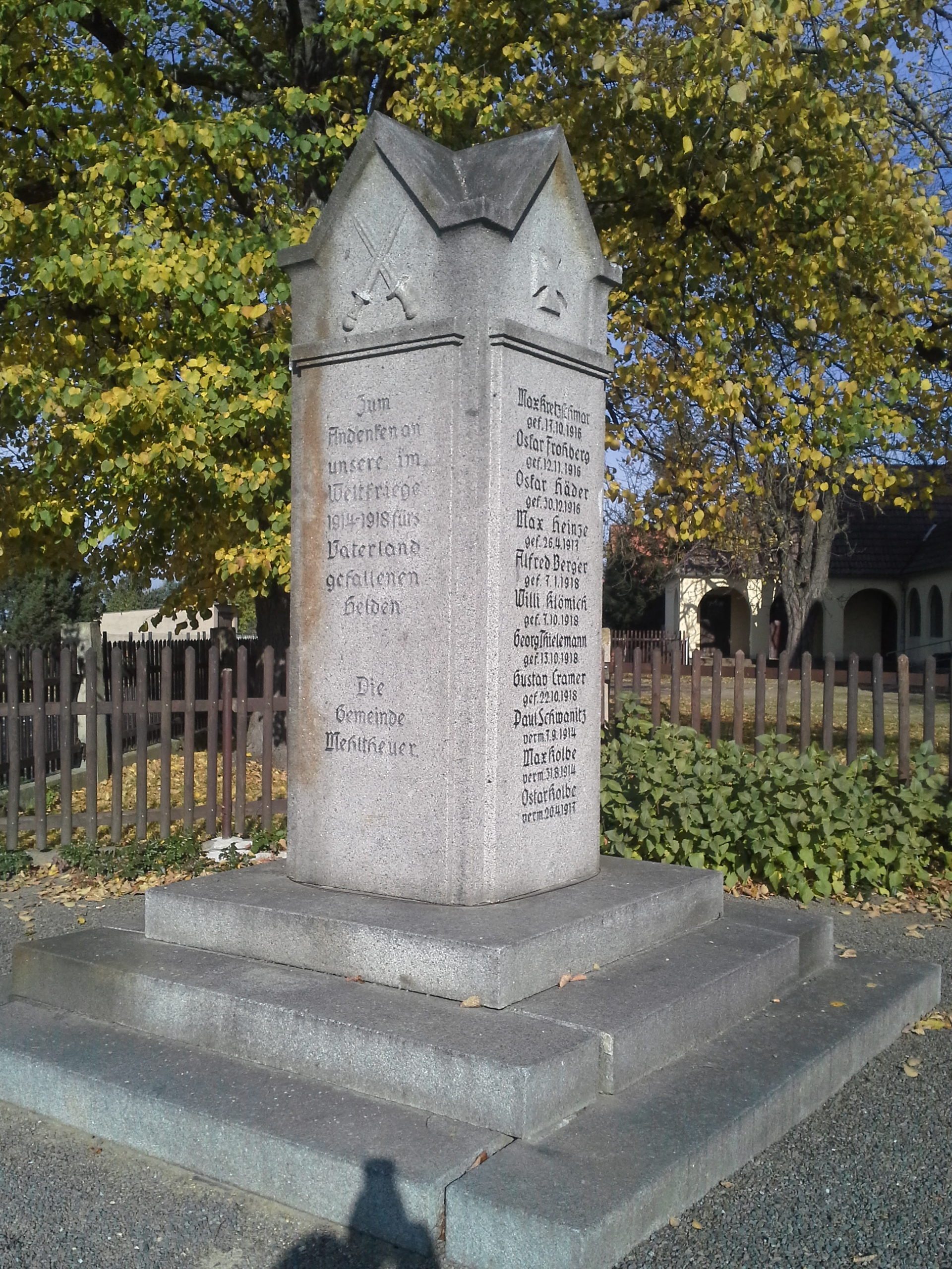 Gefallenendenkmal in Mehltheuer(Hirschstein)